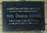 Памятная табличка на доме, где проживал Л. Заменгоф в Гродно